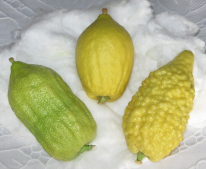 3 etrog varieties